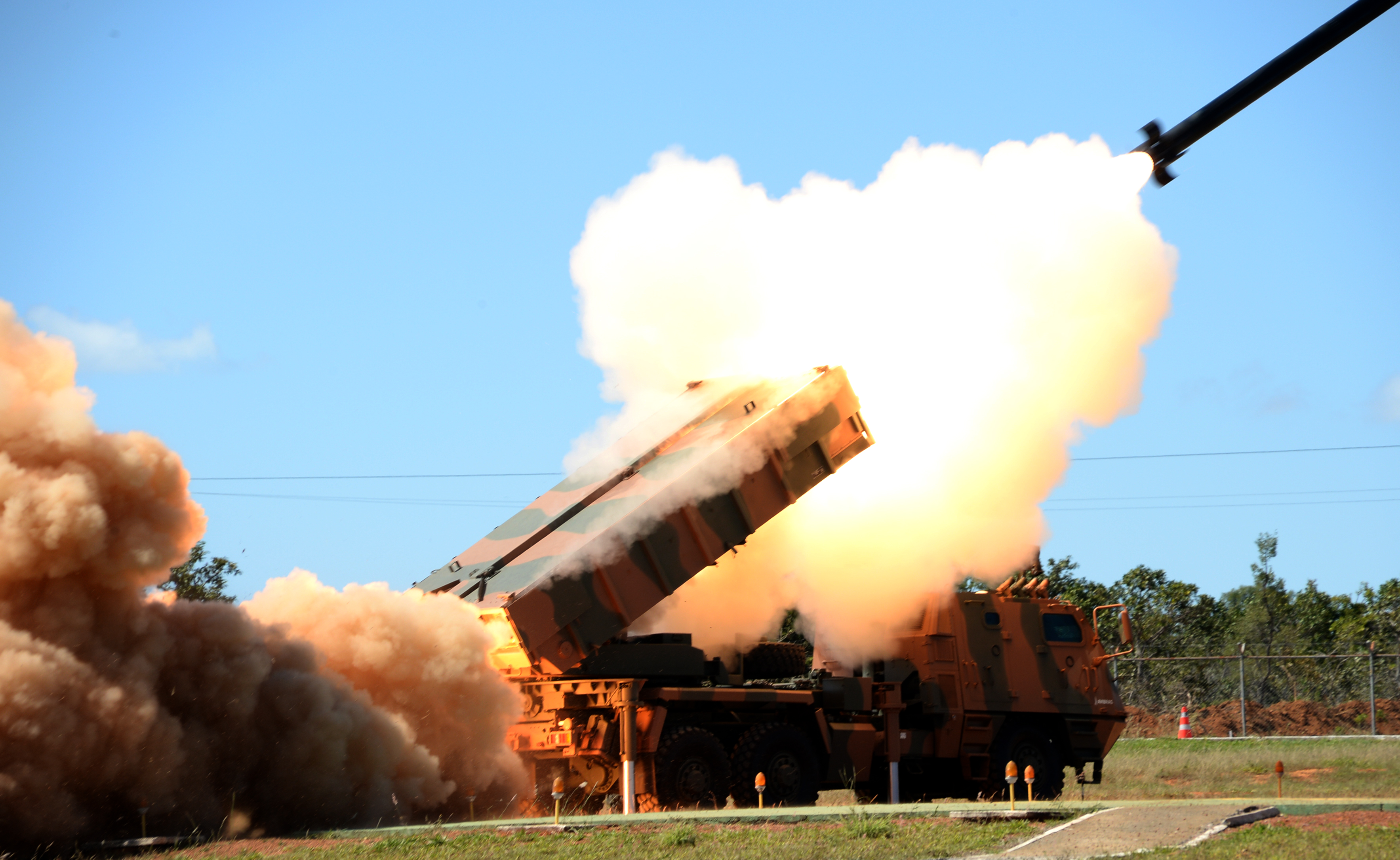 06/06/2014, Formosa - GO Fotos: Jorge Cardoso